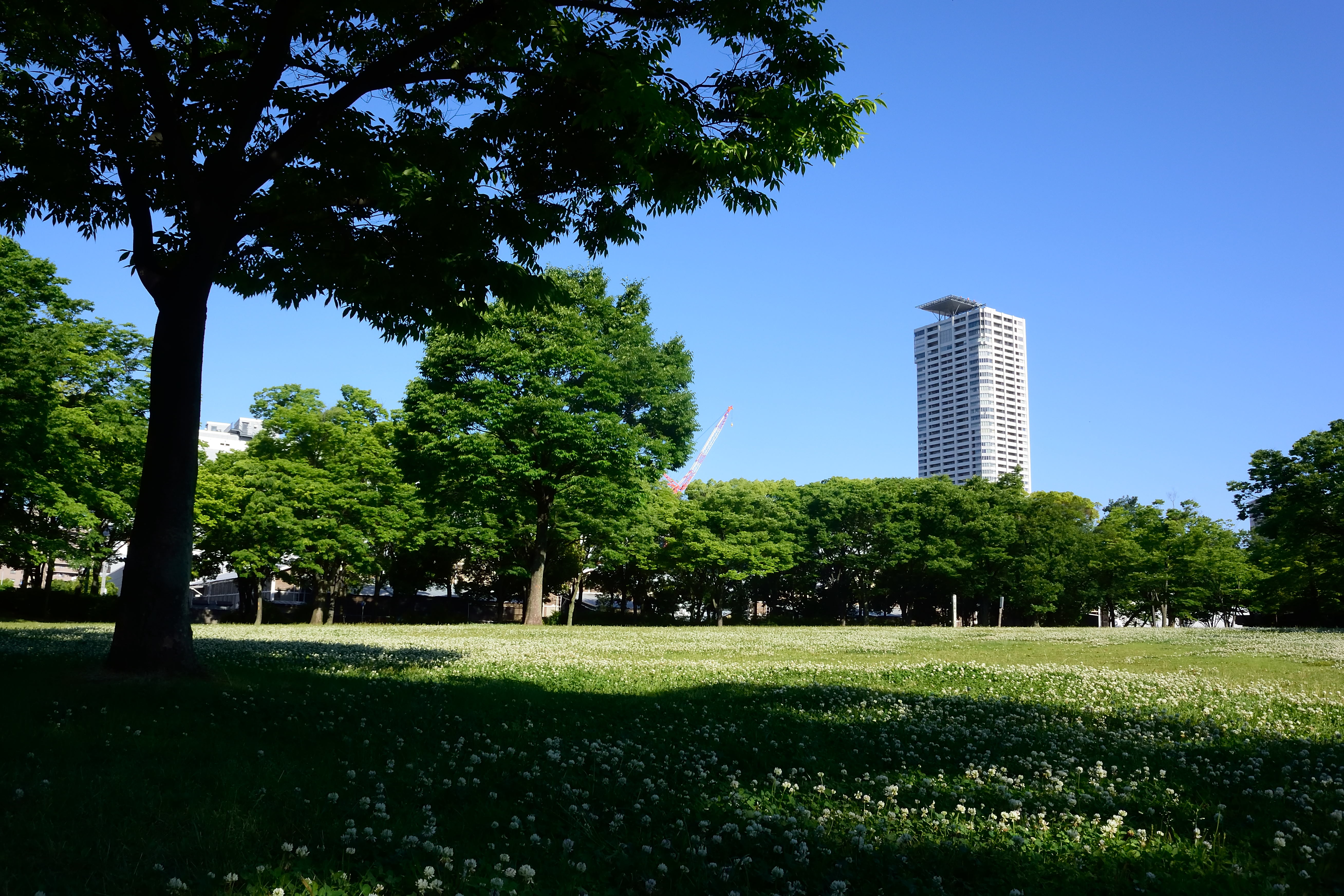 神宮東公園 北園芝生広場